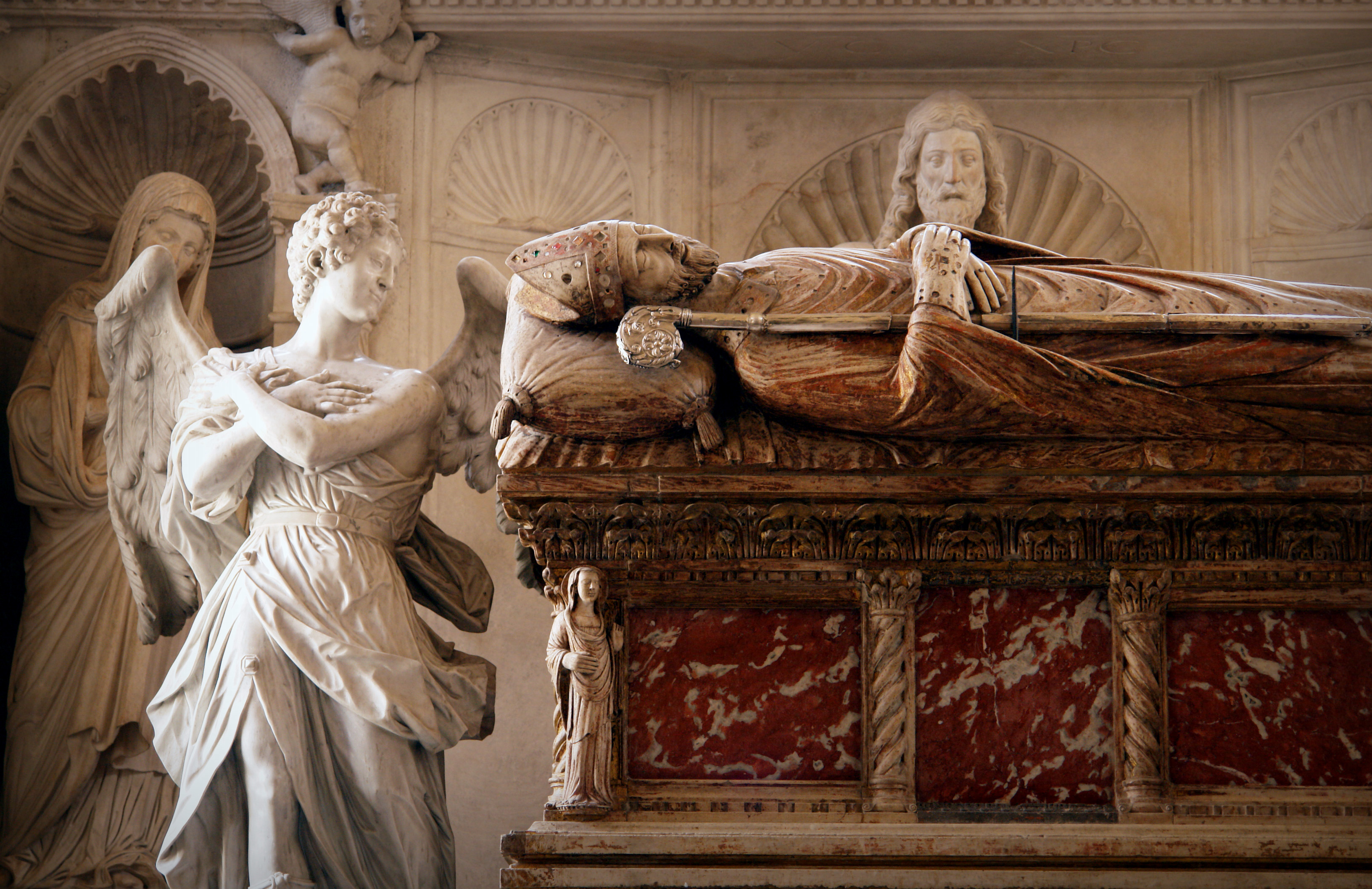 Szent Lőrinc katedrális, mellék-kápolna, Trogir. Katedrala Sv. Lovre, Trogir. The Cathedral of St. Lawrence in Trogir. This is a a photo of a cultural heritage in Croatia with ID: Z-3489